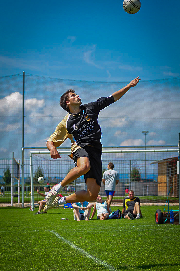 Christian Erlenmeyer beim Turnier in Jona/Schweiz 2010